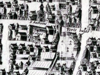 sur un plan de 1618 gravé par H Picart.